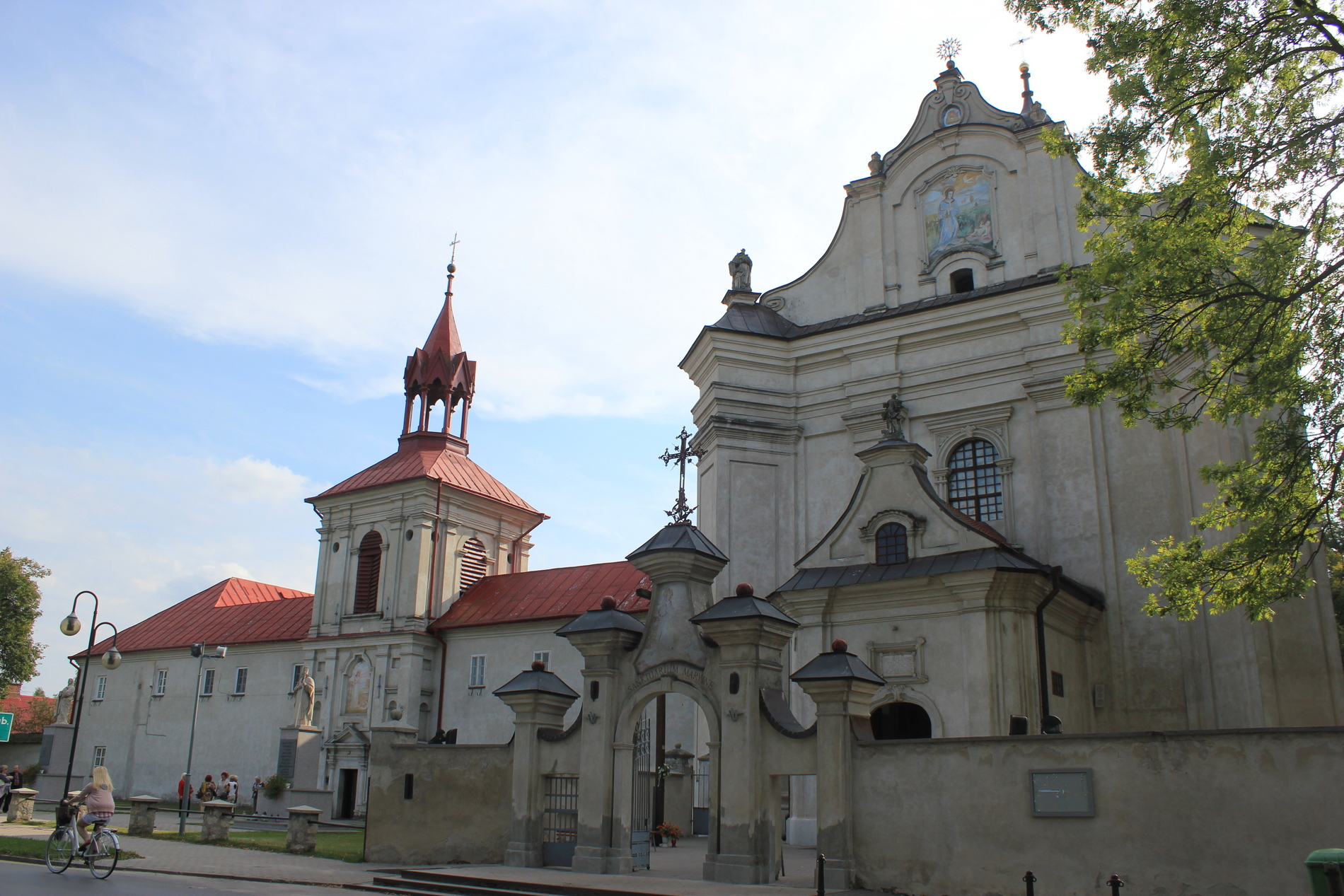 Hornjoserbsce: Klóšterska cyrkej w Krasnobrodźe, Lublinske wojewódstwo, Pólska.